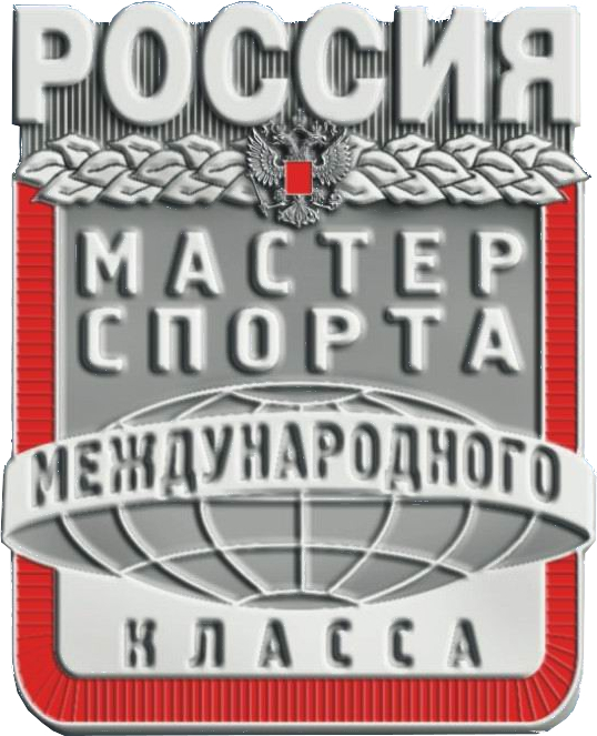 Знак к спортивному званию «Мастер спорта России международного класса»